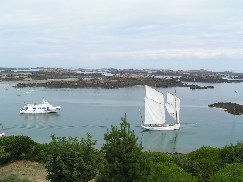 La Granvillaise Chausey (Manche)